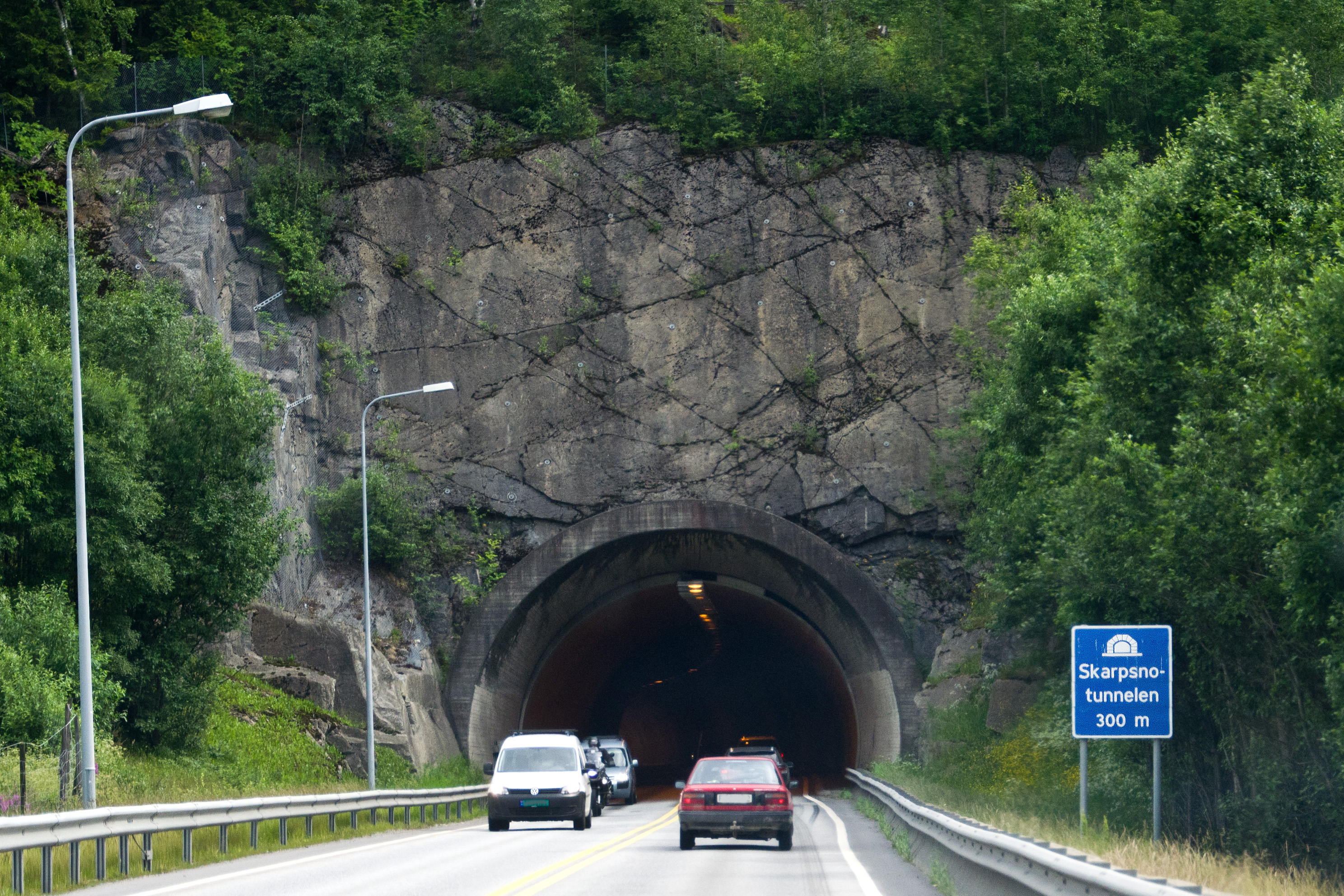 Skarpsnotunnelens nordre innslag på E6 i Hedmark.